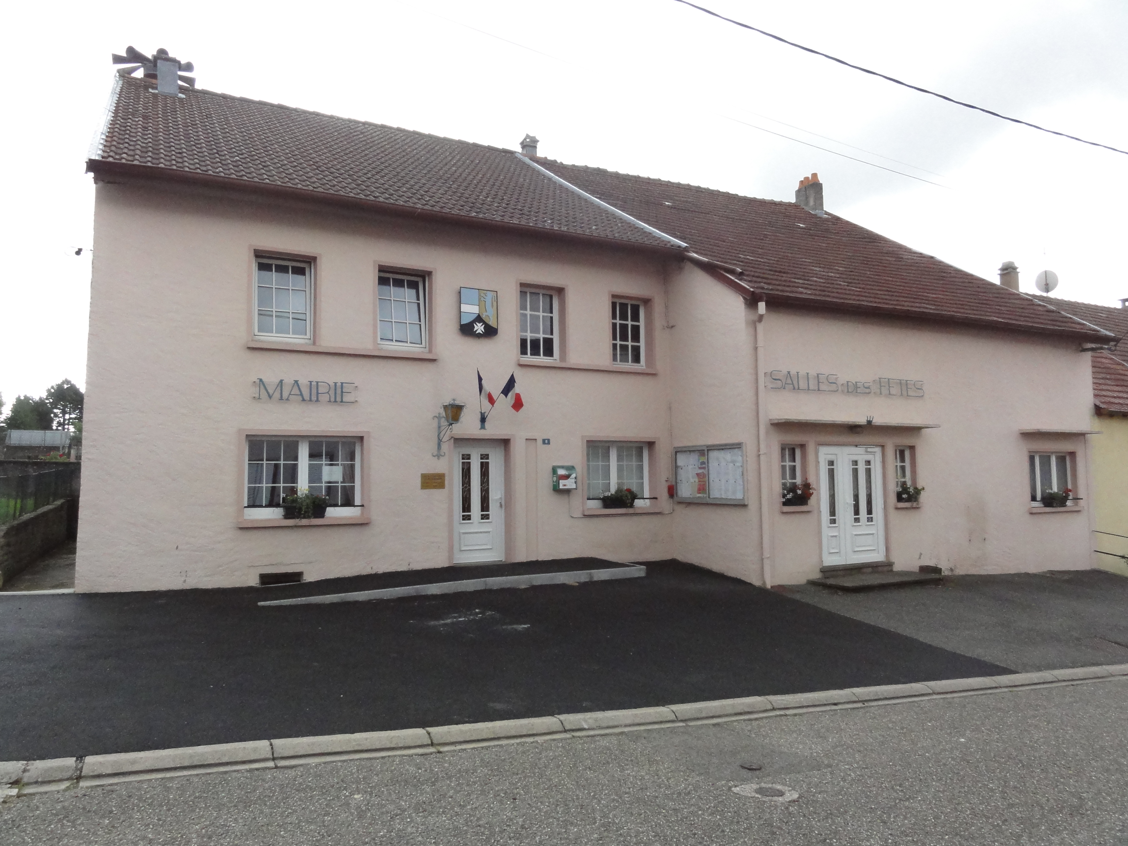 Bettborn (Moselle) mairie - salle des fêtes